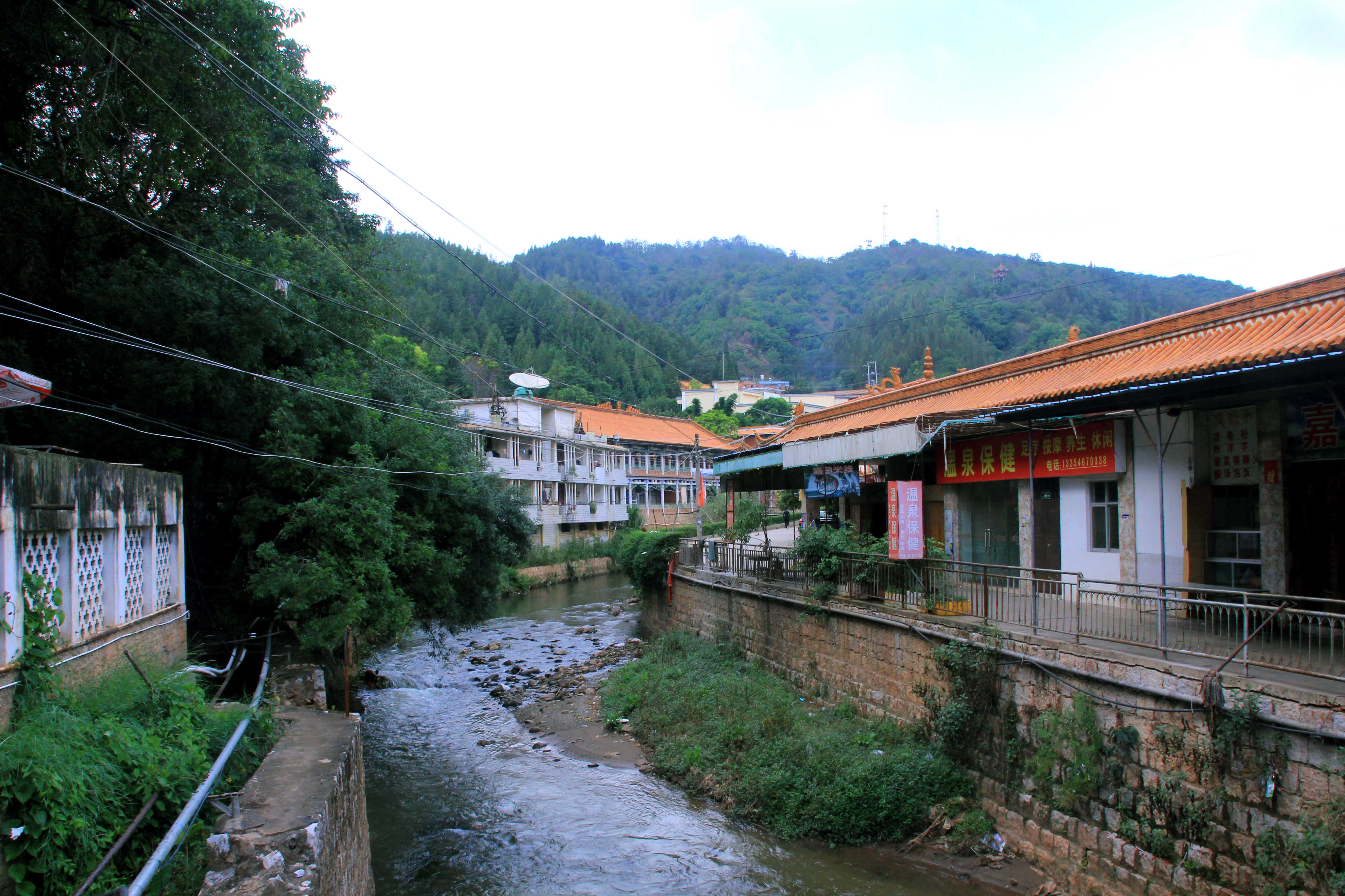 龙洞河流经华宁县象鼻温泉河段。